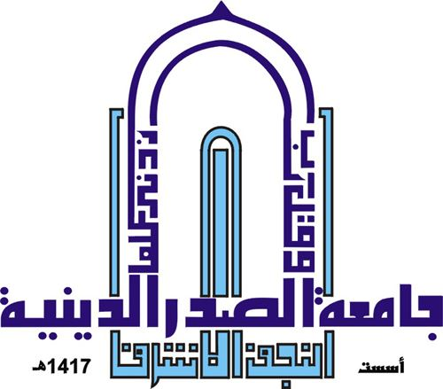 جامعة الصدر الدينية - النجف الاشرف تاسست عام 1419هـ - 1999م